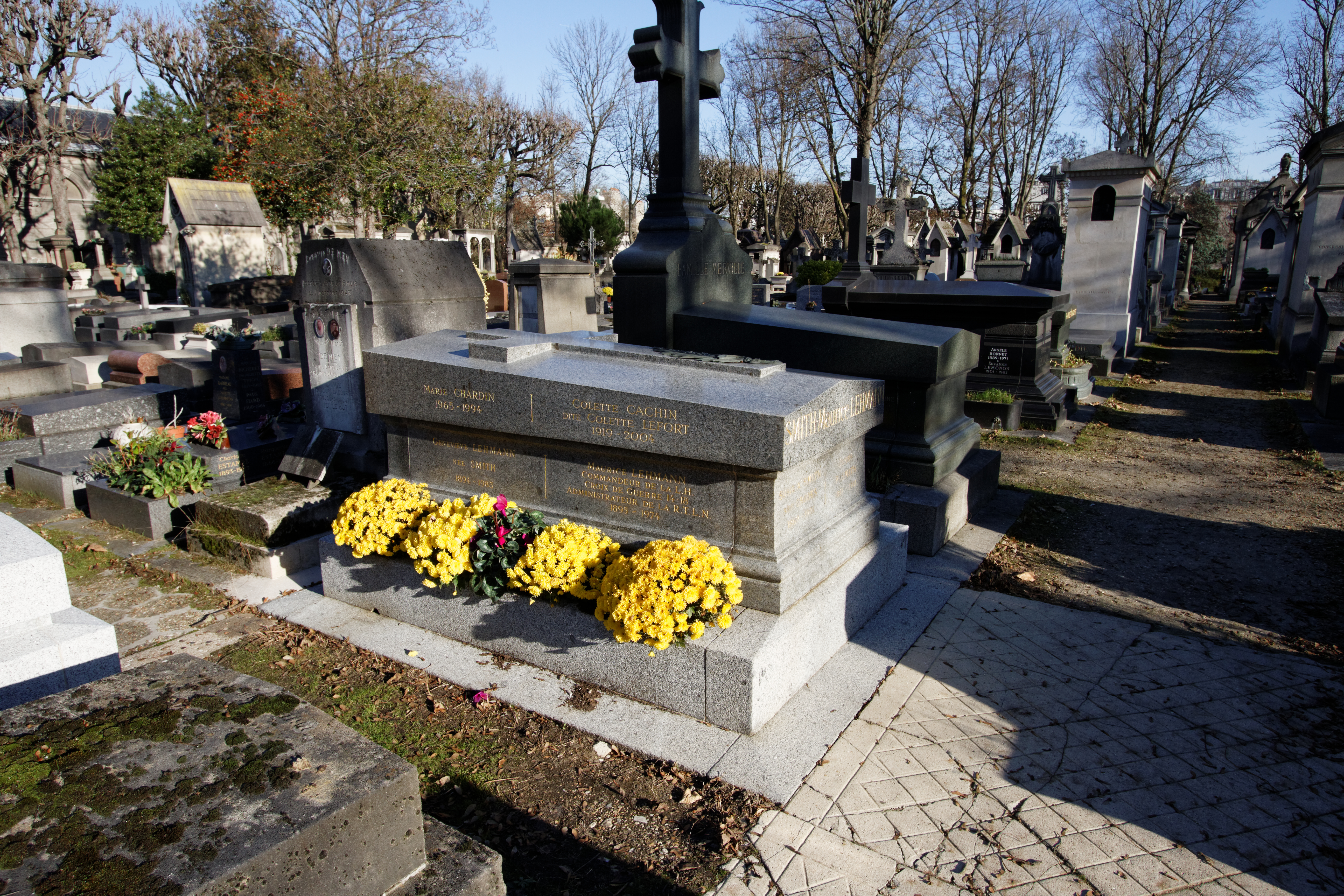 Sépulture de Maurice Lehamnn (1895-1974), acteur, metteur en scène, producteur, président du jury du Festival de Cannes 1956. Il est un des principaux directeurs de théâtres parisiens du XXe siècle.